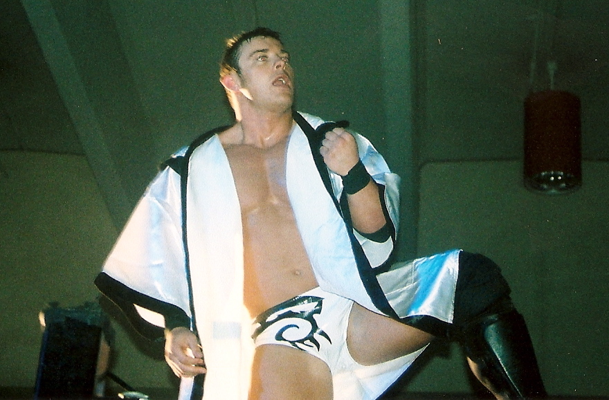 Wrestler Davey Richards